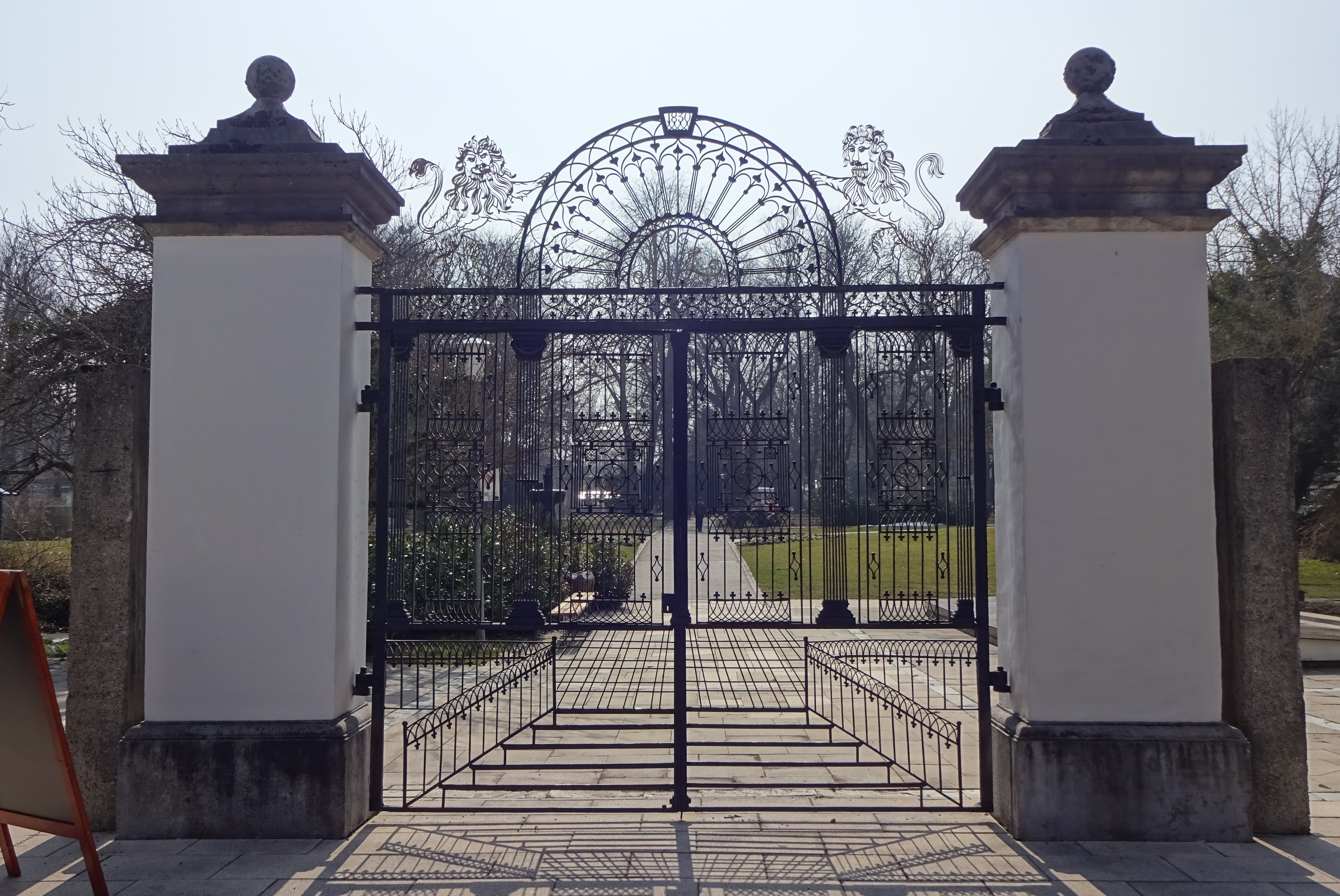 Gartentor neben dem Zumsteinhaus, Ansicht von Norden